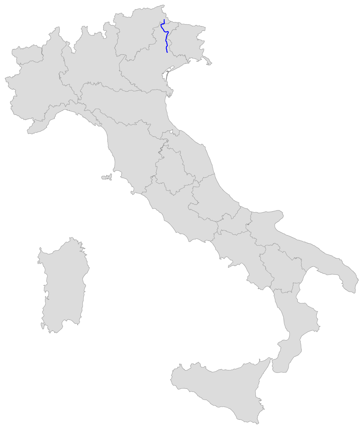 Percorso della SS 51 di Alemagna